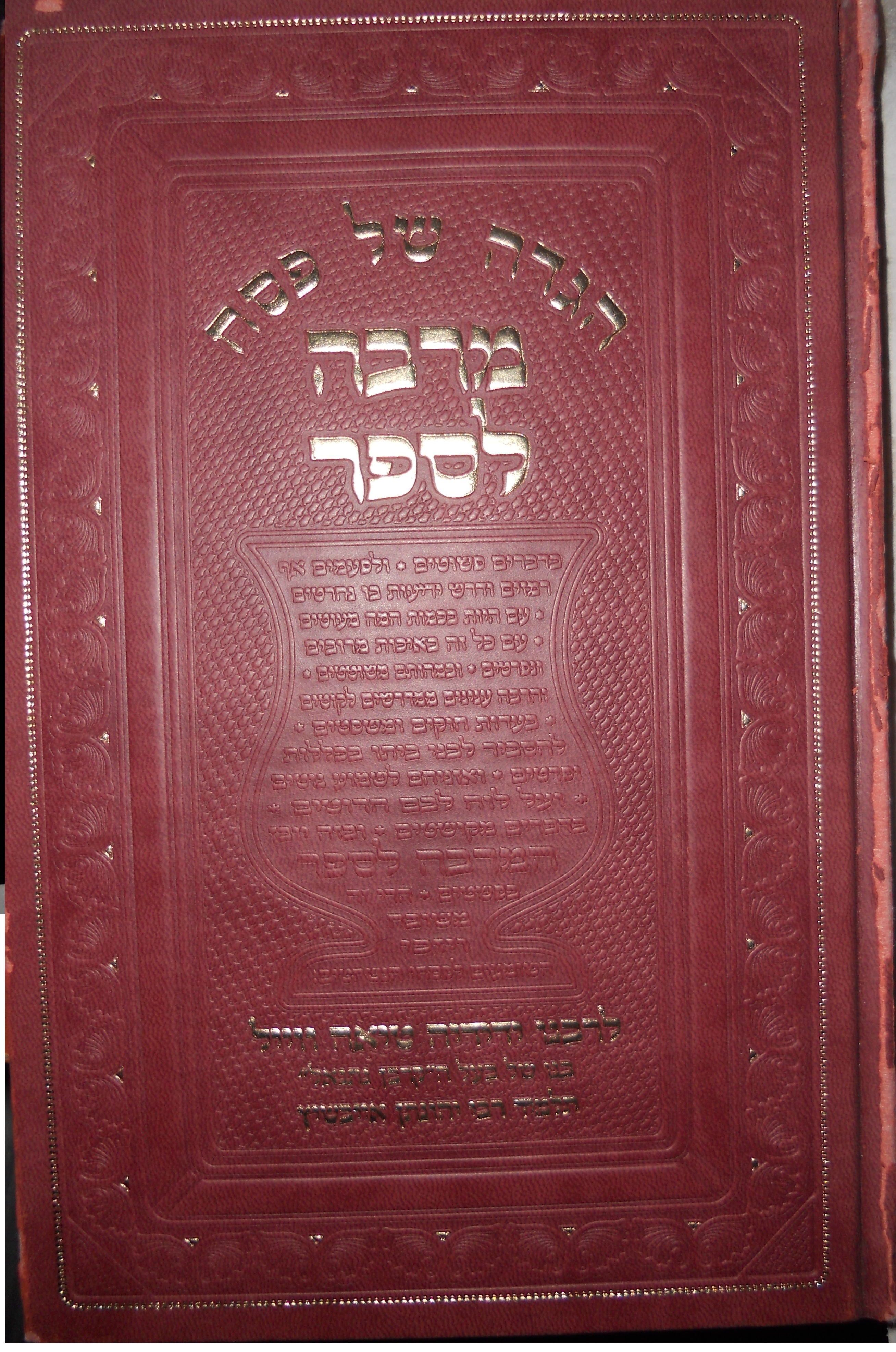 הגדה של פסח "מרבה לספר" עם פירוש רבי ידידיה וייל